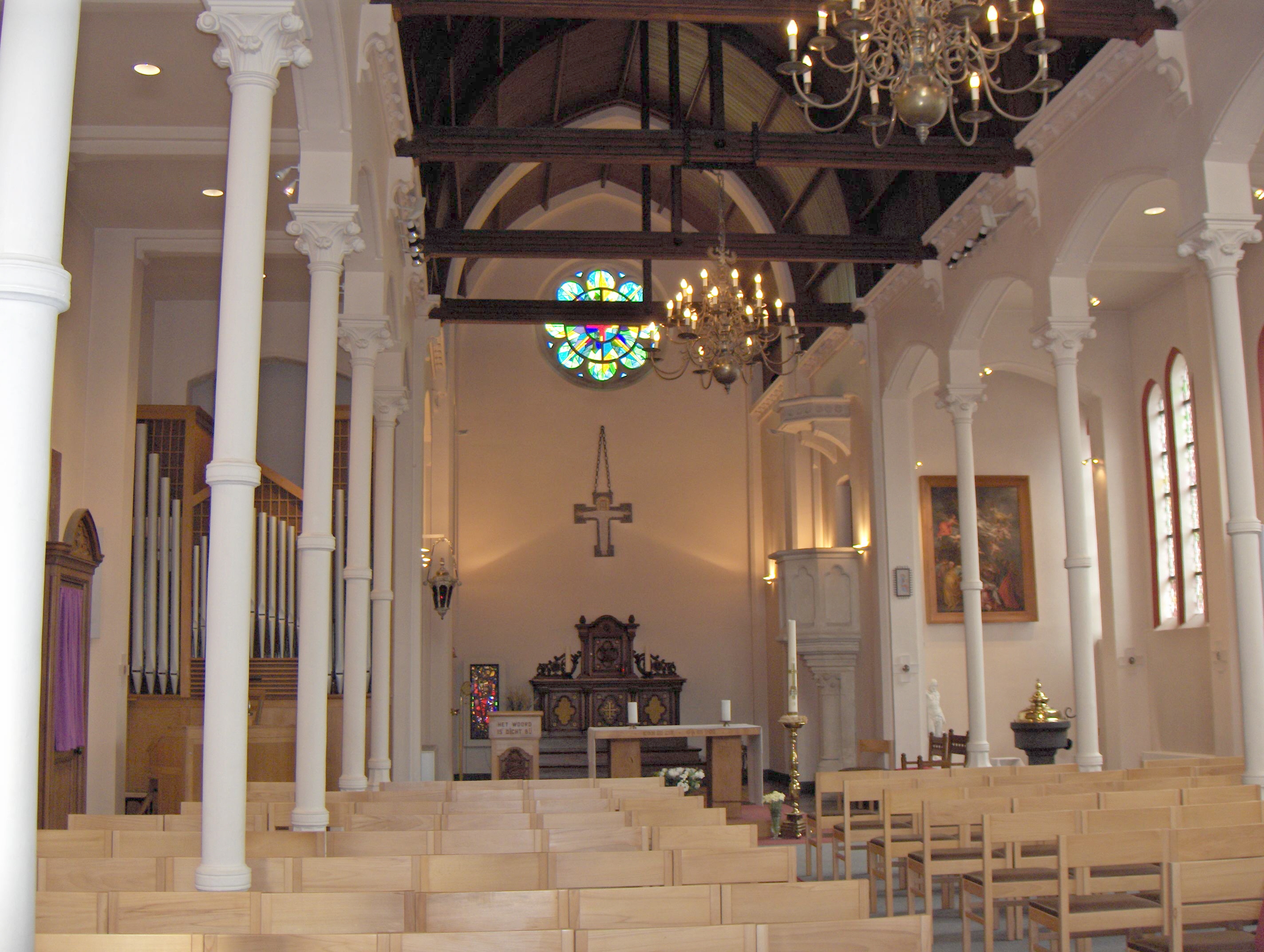 Bild: Lillo (Belgien), Benediktikirche (Sint-Benedictuskerk), Kircheninnere (Neugotik, 19. Jh.) Fotograf: Friedrich Tellberg Datum: 2005-08-07